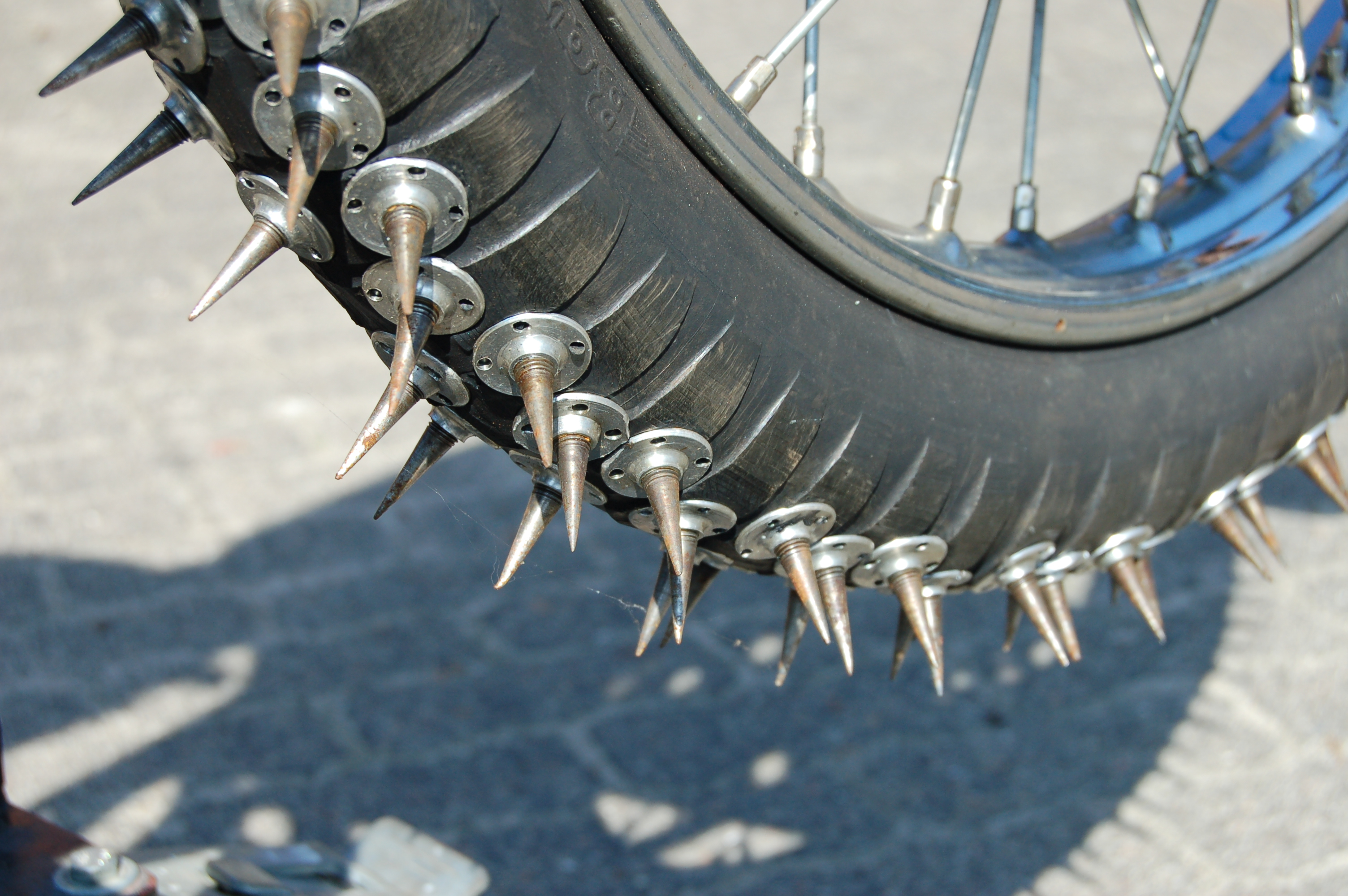 Spikes am Hinterrad einer Eisspeedway Maschine linke Seite, diese Seite hat die meisten Spikes, weil nur linksrum gefahren wird.